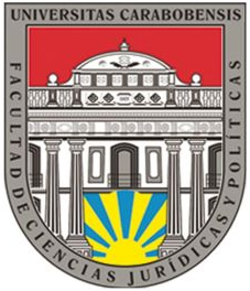 Logo de la Facultad de Ciencias Jurídicas y Políticas